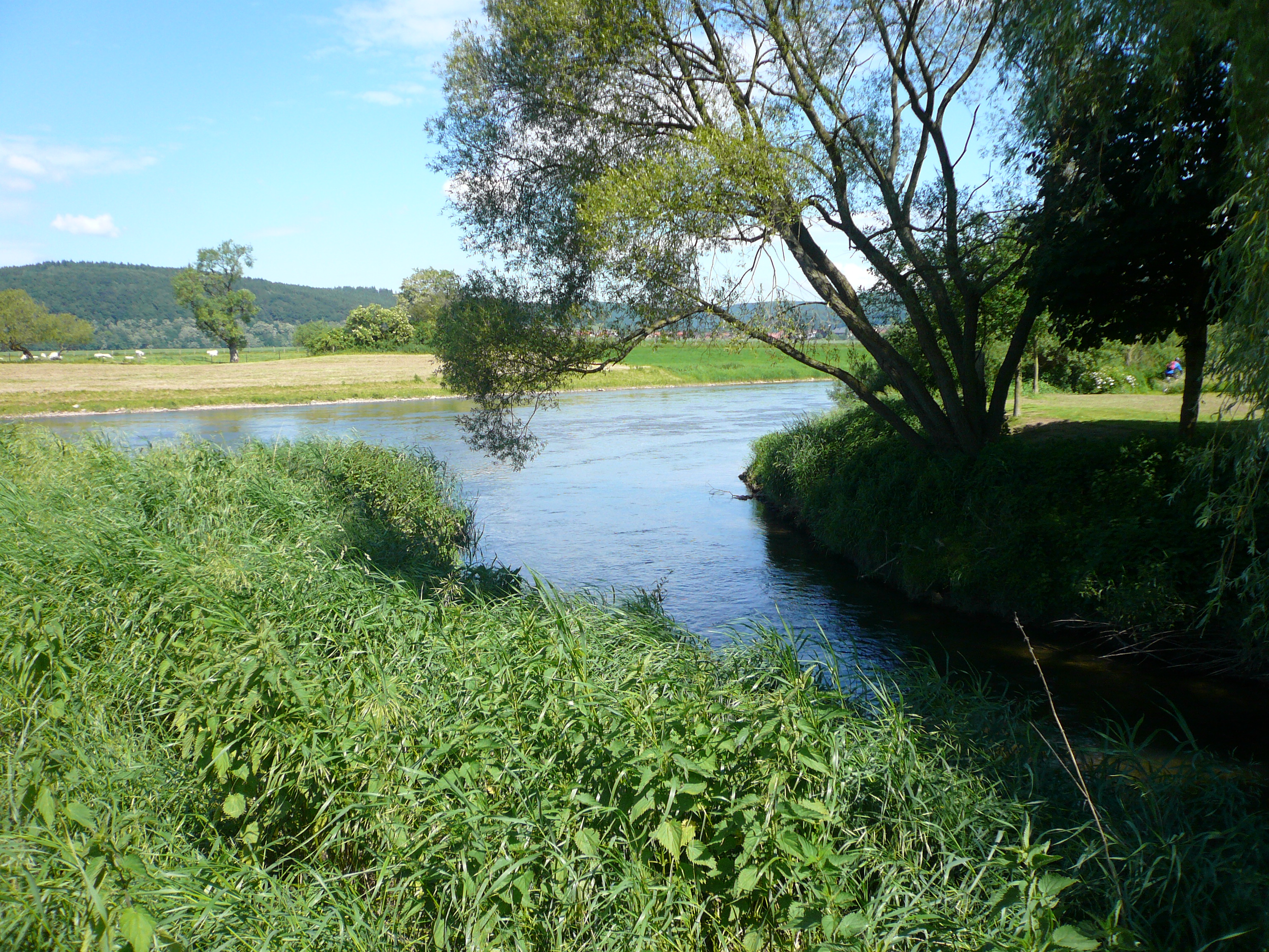 Mündung der Schwülme (vorne) in die Weser bei Wahlsburg-Lippoldsberg